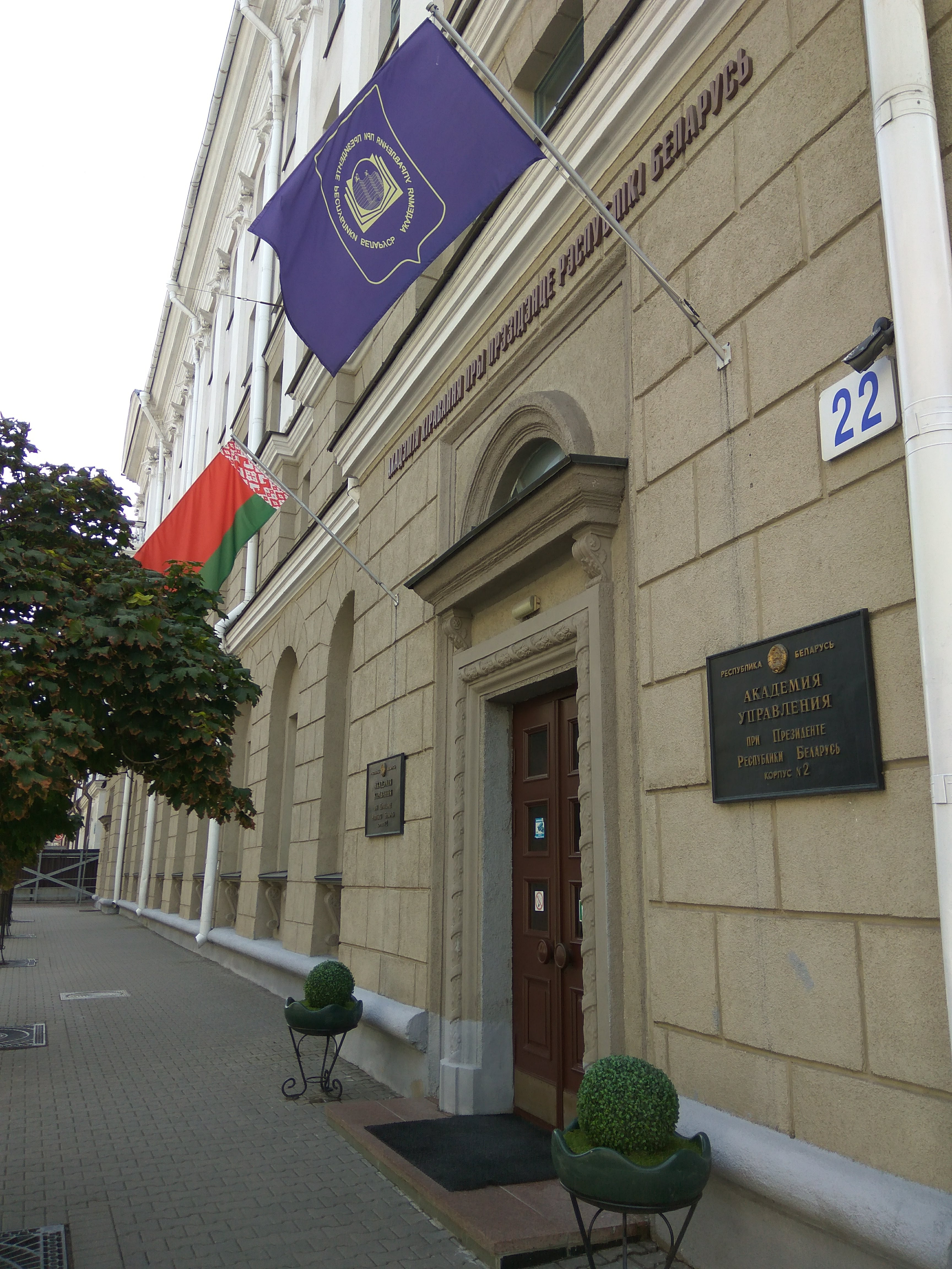 Мінск. Вуліца Карла Маркса. Акадэмія кіравання. Корпус 2